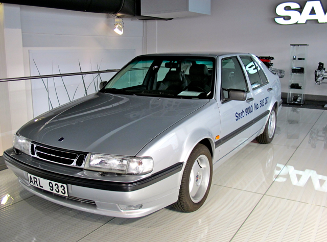 Saab 9000 på Saab Car Museum i Trollhättan